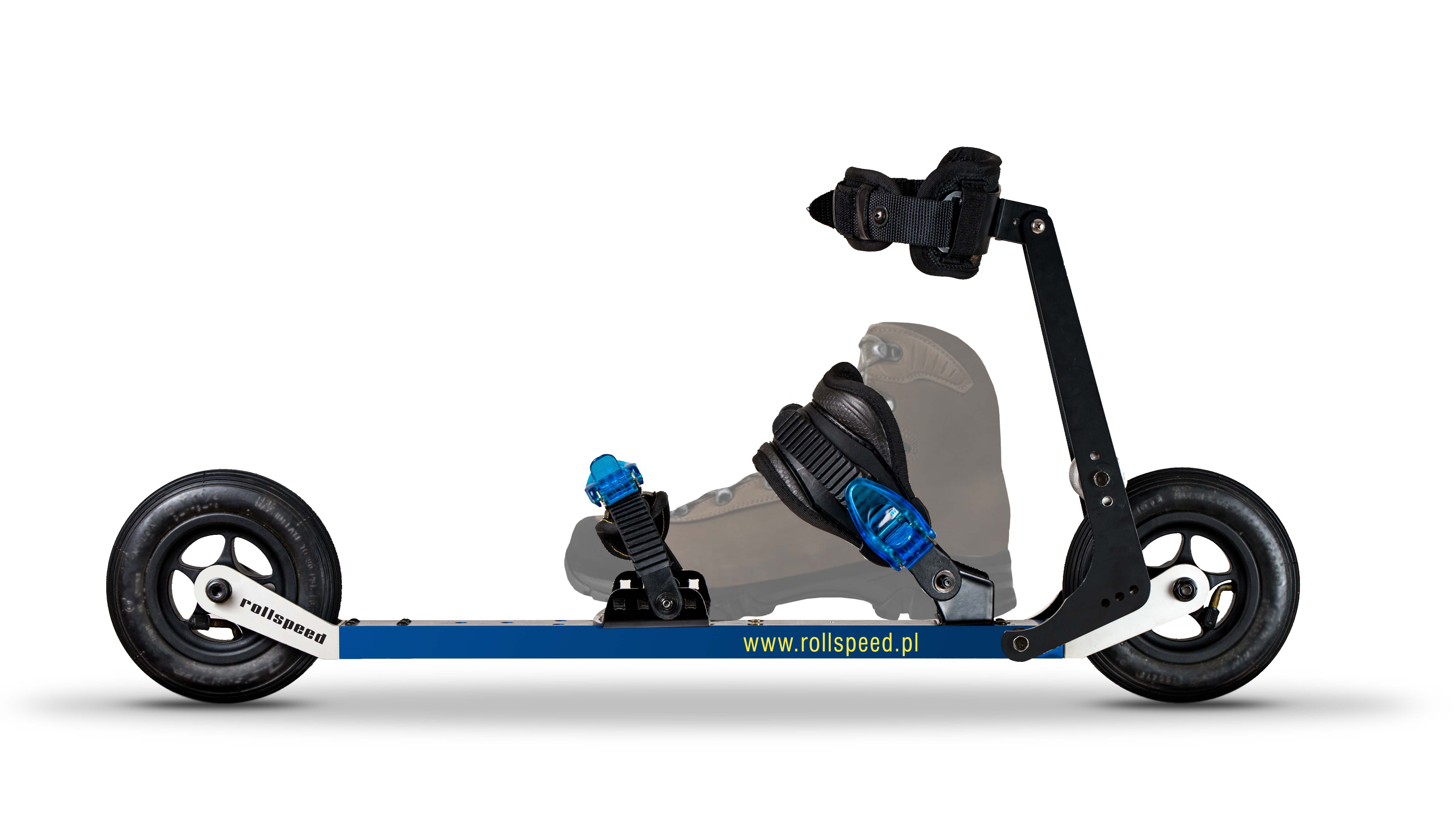 Nartorolki terenowe rollspeed polski producent rollspeed.pl